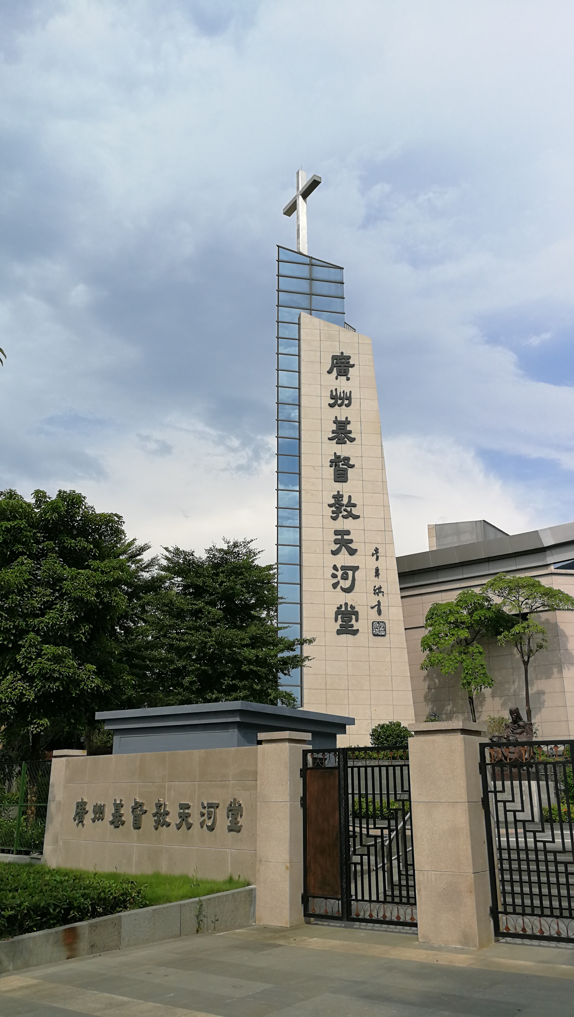 廣州基督教天河堂的十字架